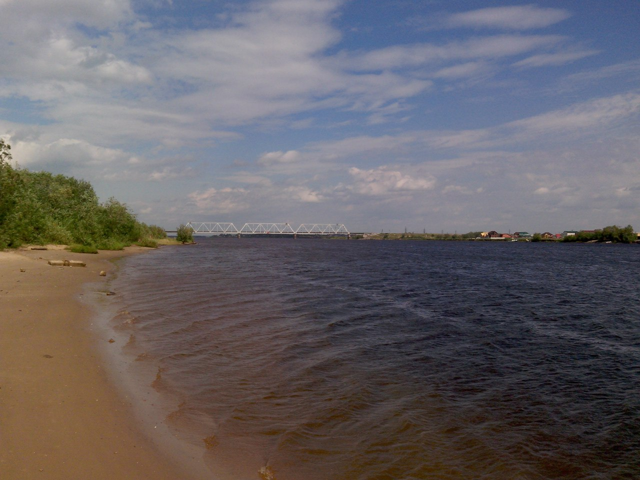 Пляж, мост, река Кузнечиха в Северном округе